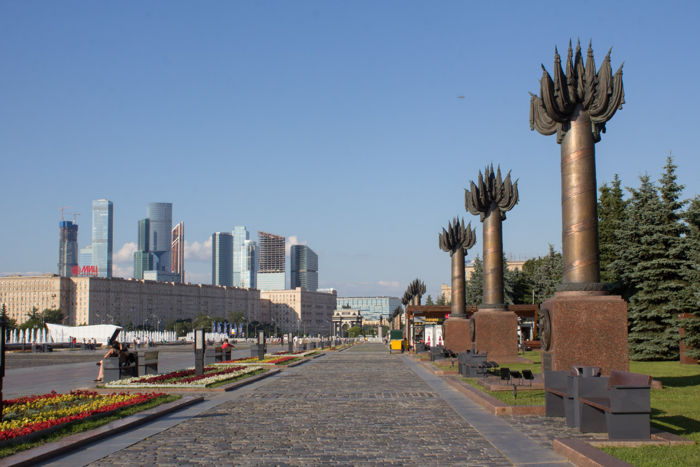 Поклонная гора. Июль 2018